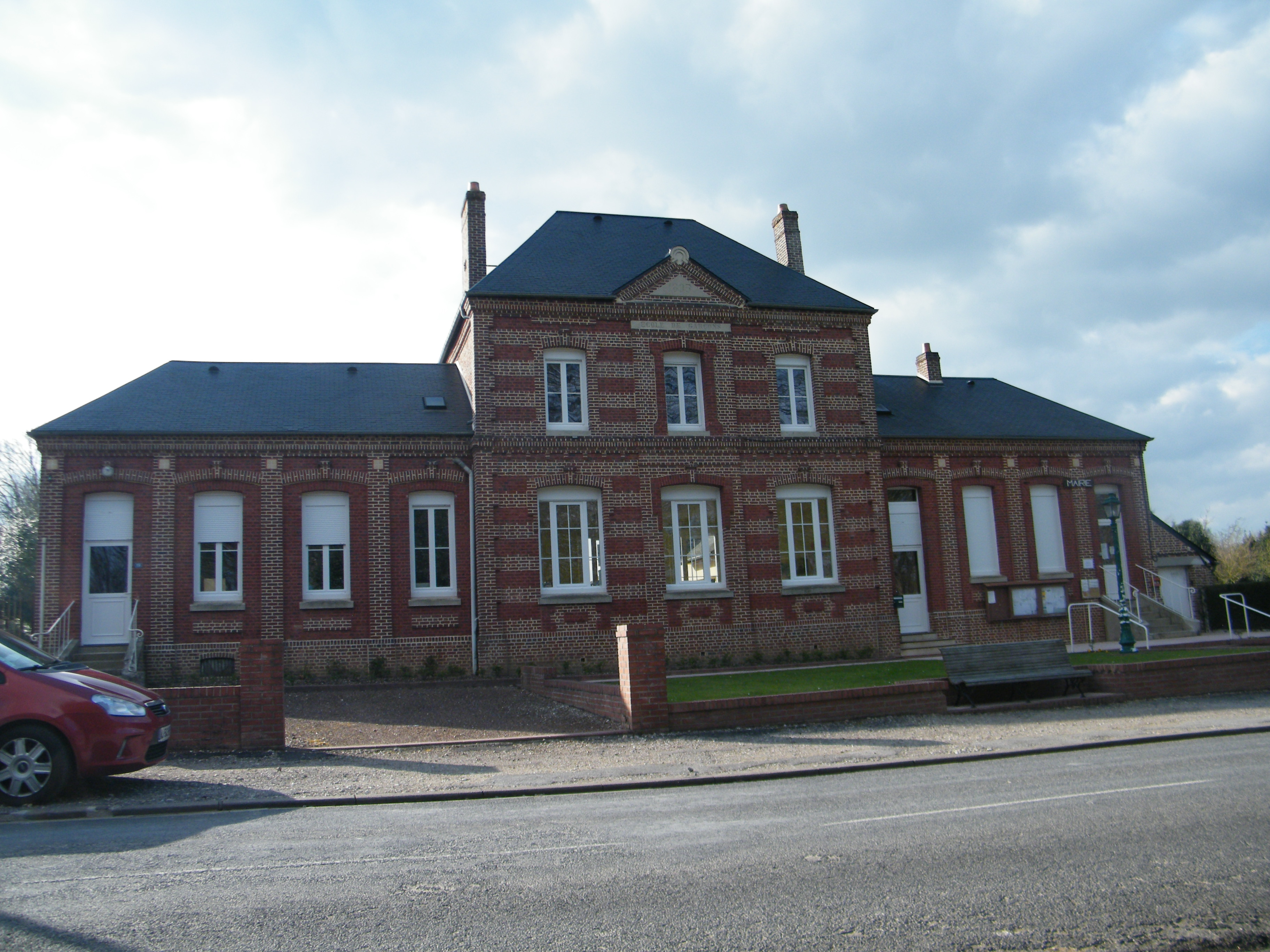 Mairie-école